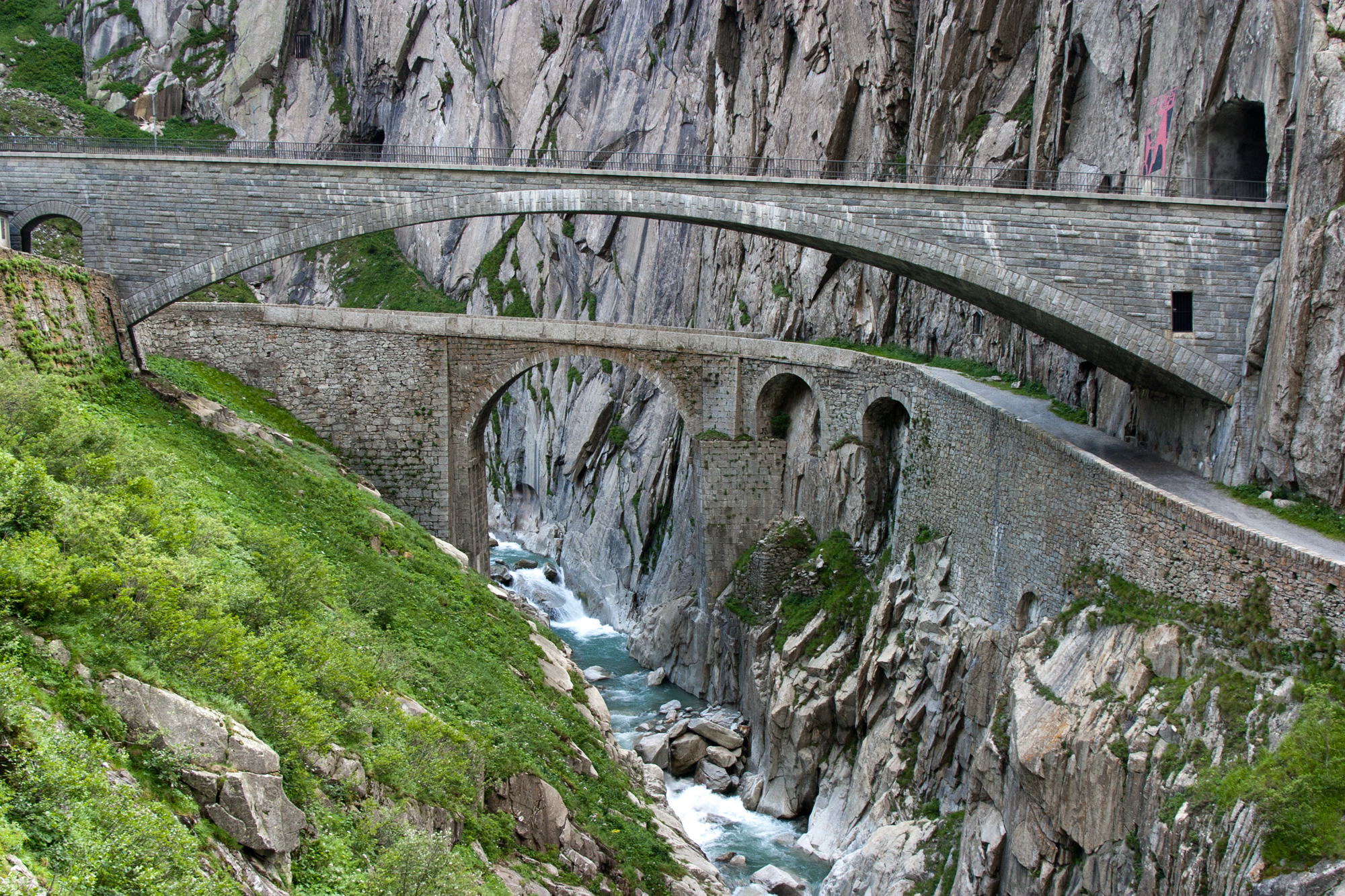 Die alte und neue Teufelsbrücke in der Schöllenenschlucht bei Andermatt